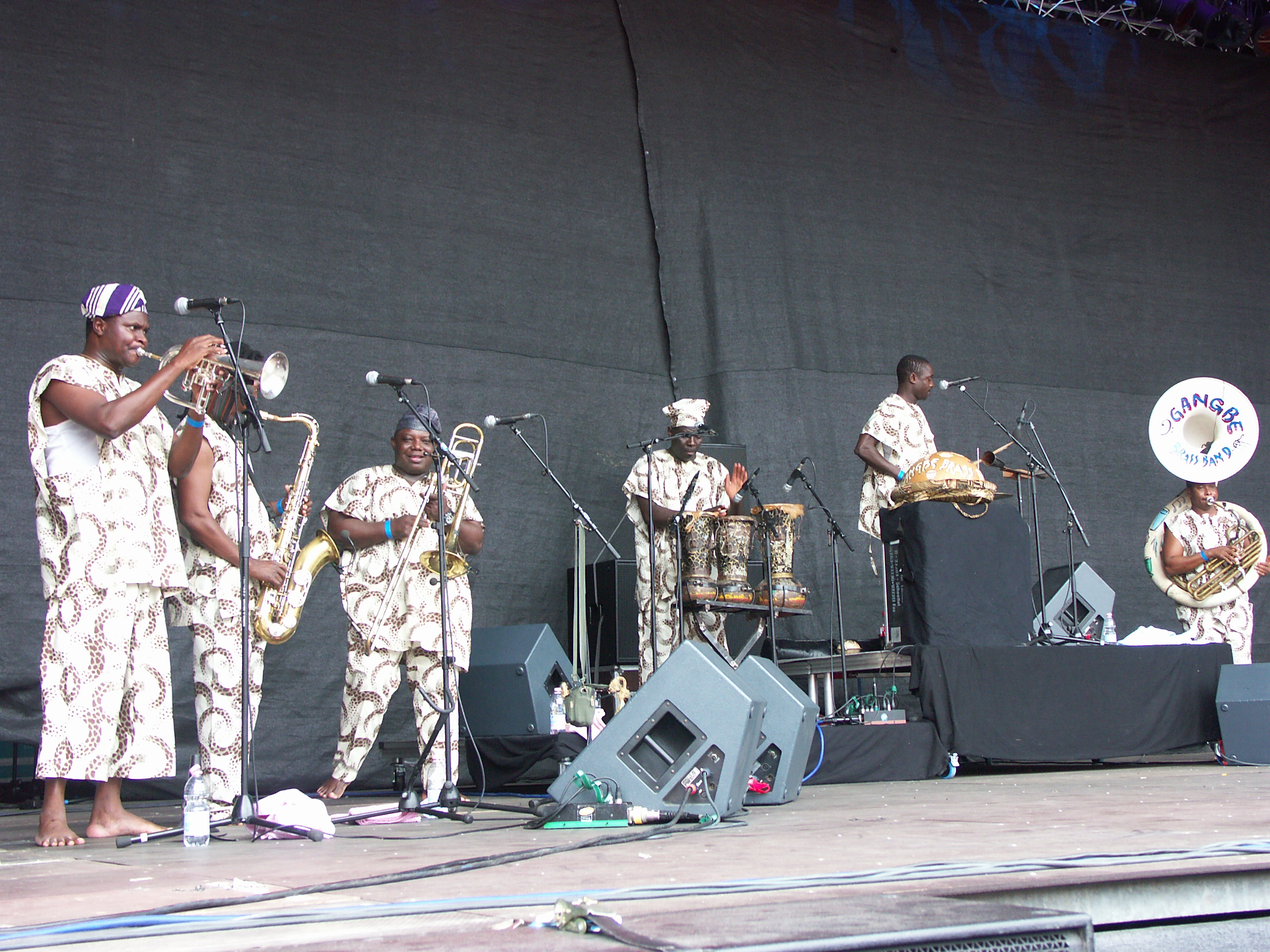 Gangbé Brass Band (BJ), Bühne Hauptmarkt - Festival "Bardentreffen" in Nürnberg 2009 - Music festival "Bardentreffen" 2009 at Nuremberg / Germany